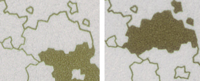 Detailänderung bei der Briefmarkenserie: Wappen der 16 Länder der Bundesrepublik Deutschland